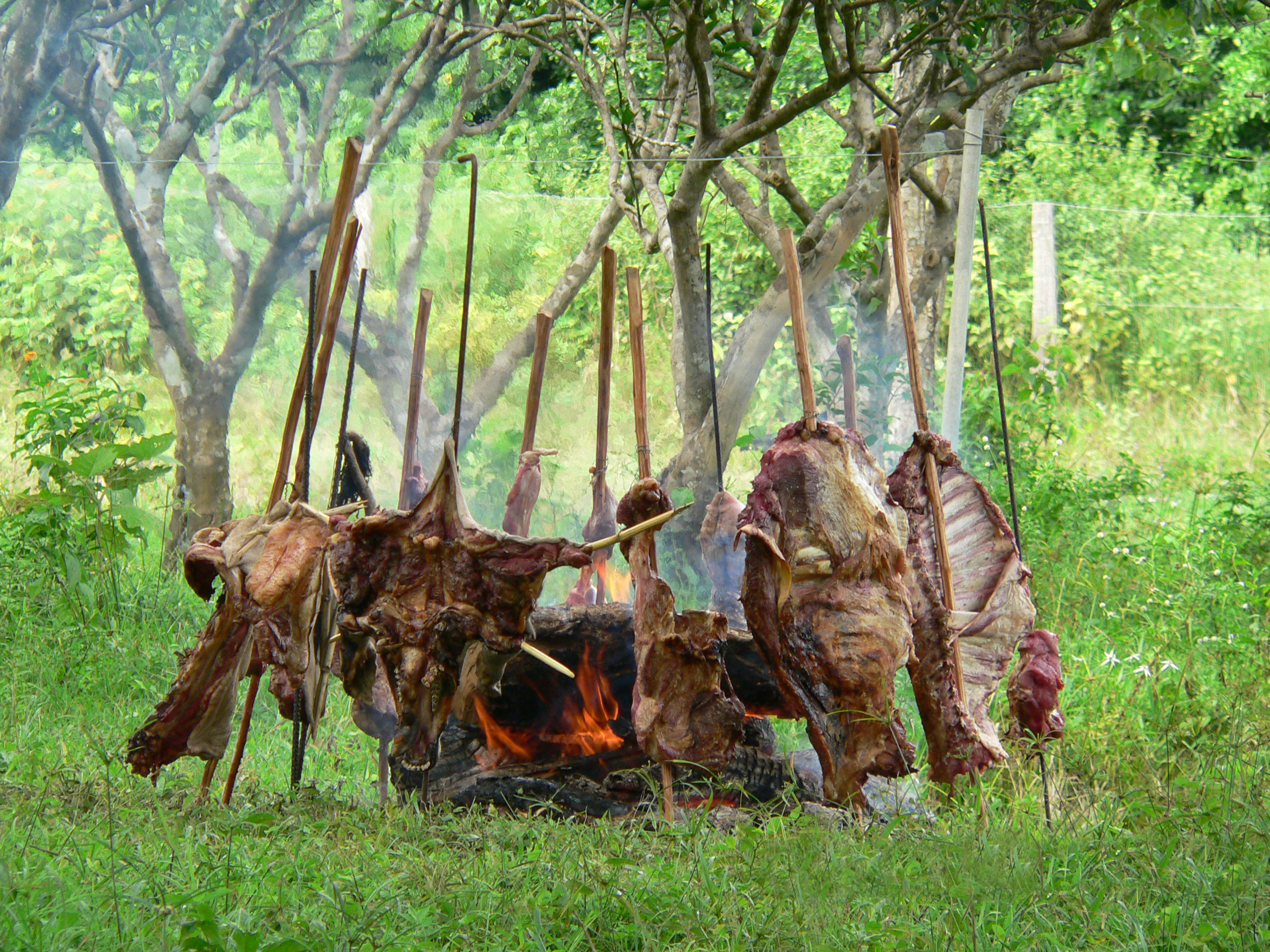 Ternera a la llanera, asado de carne de res, plato típico del llano colombovenezolano.